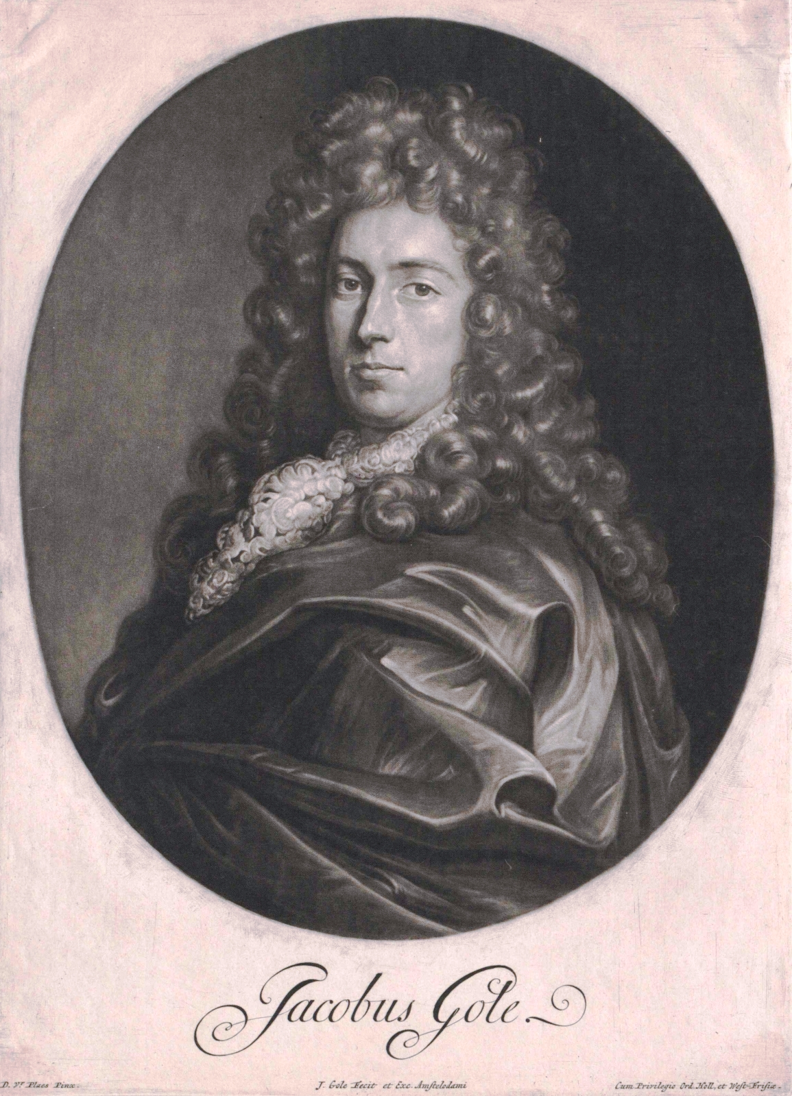 Jacobus Gole (1660–1737), nach David van der Plaes (1647–1704)